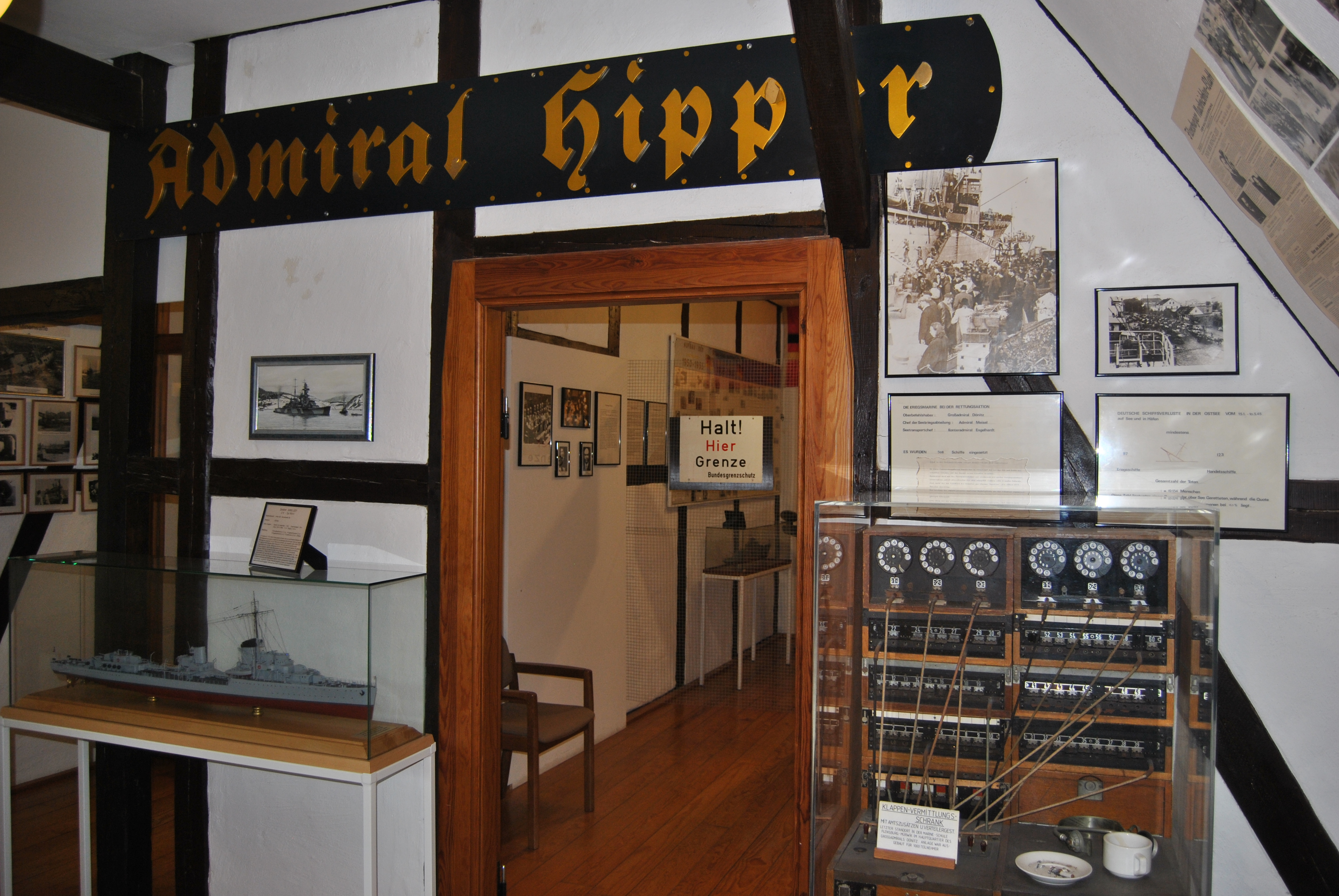 Ausstellungsraum des Wehrgeschichtlichen Ausbildungszentrums der Marineschule Mürwik: rechts Fernmeldevermittlung aus den letztes Tagen des Zweiten Weltkrieges, darüber das Thema "Flucht über See" (aus der DDR). Links ein Zerstörer-Modell; hinter der Tür Beginn der Ausstellung zur Volksmarine.